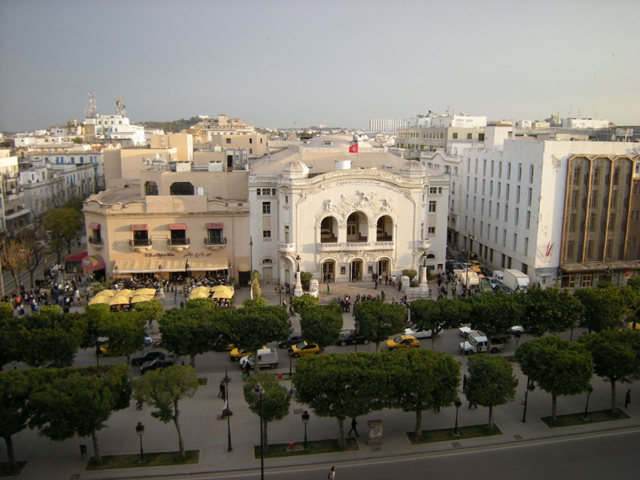 Théâtre municipal de Tunis et le Palmarium sur l'avenue Bourguiba à Tunis (Tunisie)